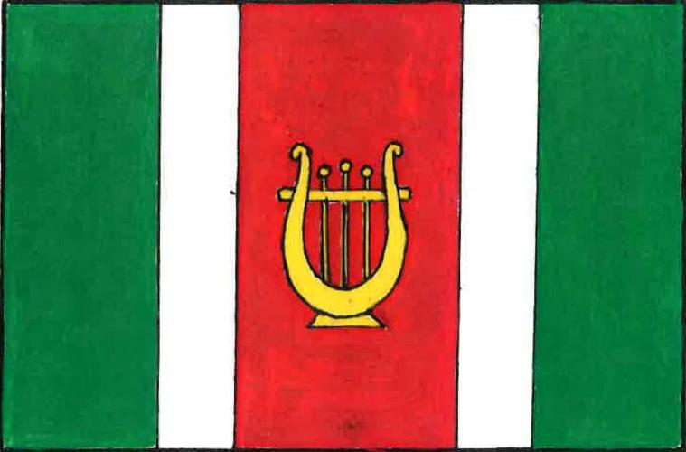 Vlajka, Vysoká u Příbramě, okres Příbram